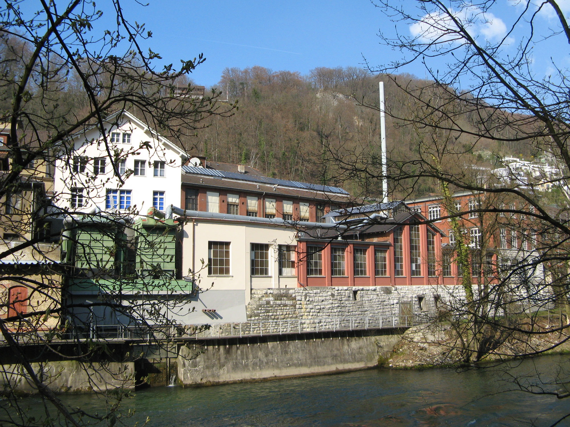 Ehemaliges Fabrikgelände der Oederlin AG in Ennetbaden